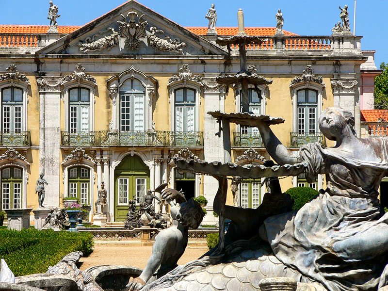 Queluz Palace in Queluz, Sintra, Portugal.